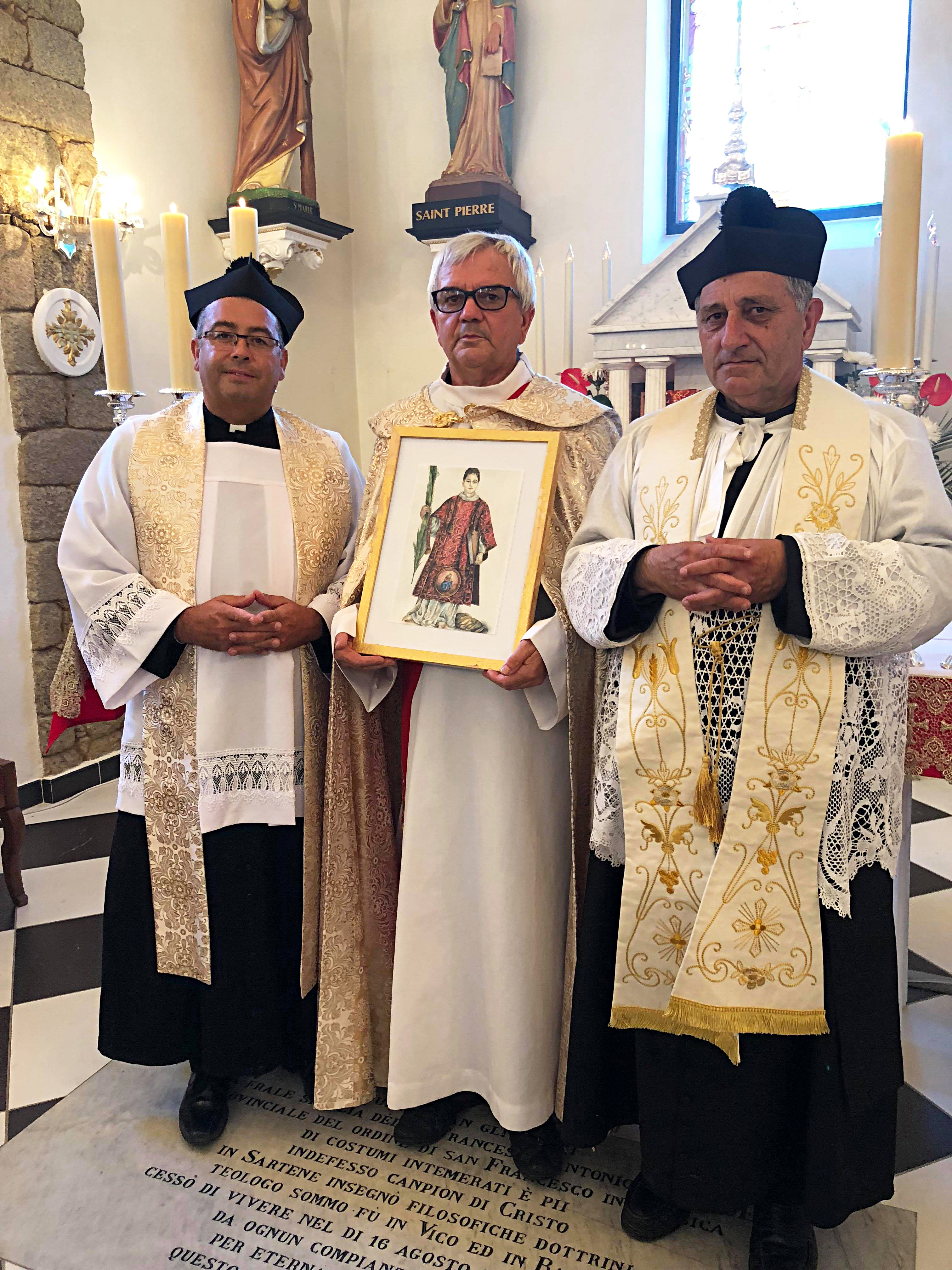 Il diacre François Valentini con l'icona di San Cesario, accanto a Abbé Christophe Boccheciampe e a don Antoine Peretti, Église paroissiale Saint Césaire martyr, Grosseto-Prugna (Corsica)